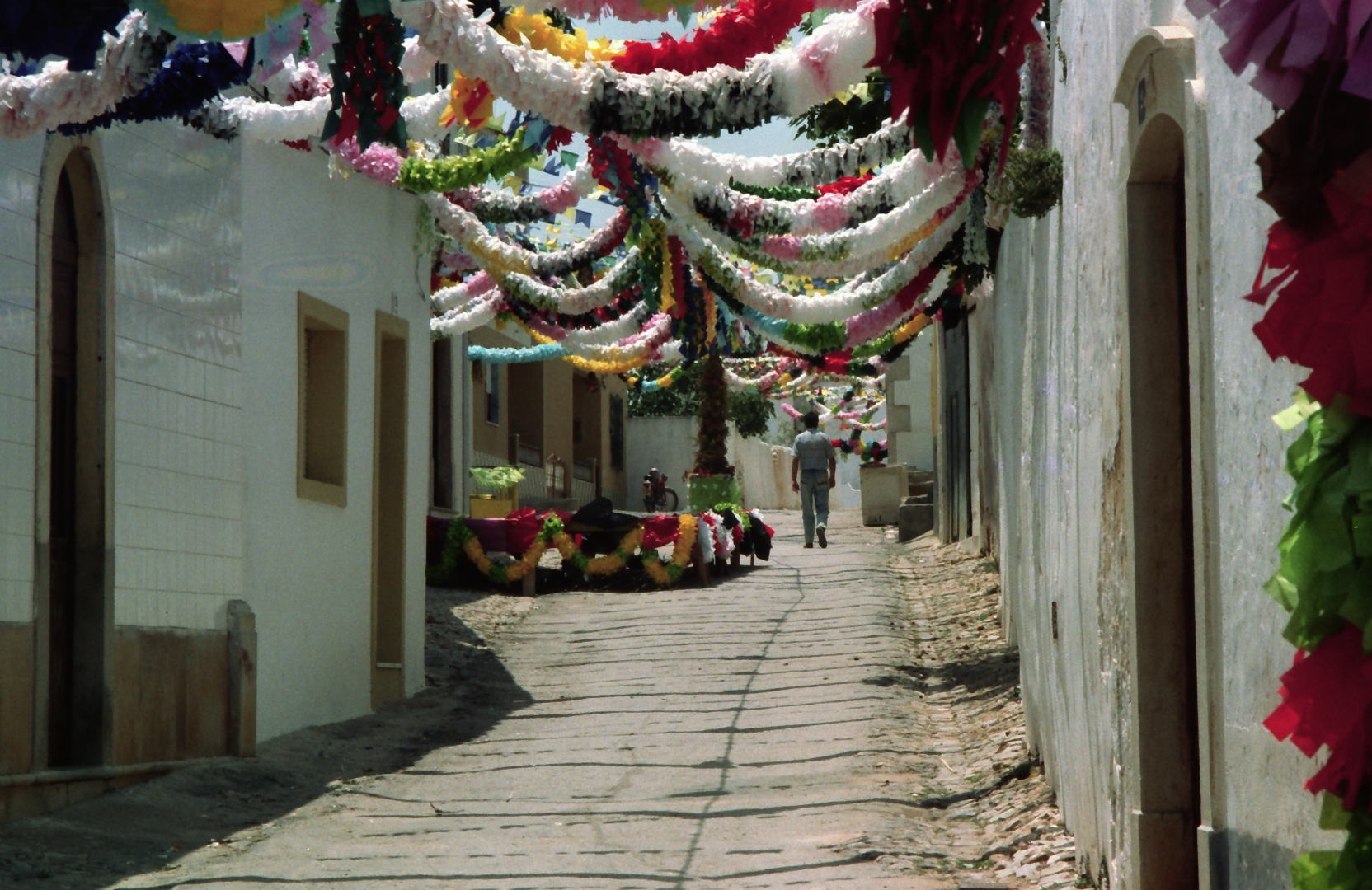 Portugal - Algarve: Moncarapacho, Straßenschmuck an Peter und Paul